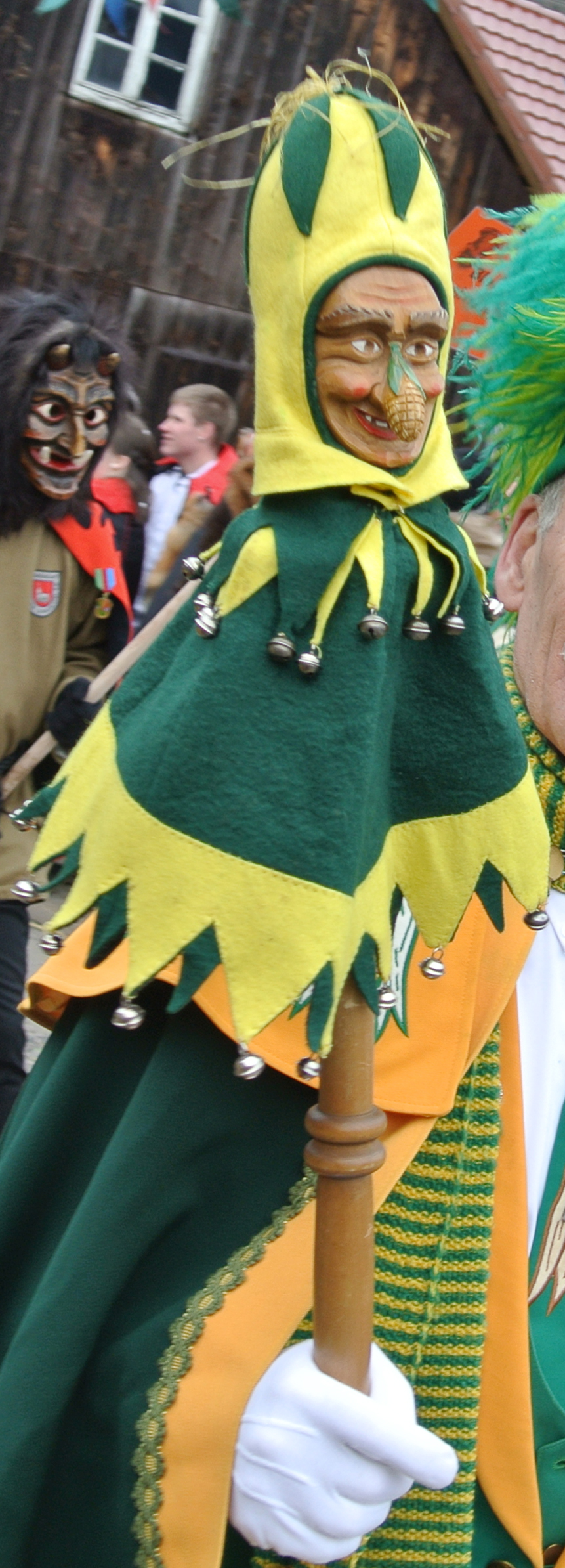 Marotte der Denzlinger Welschkorngeister